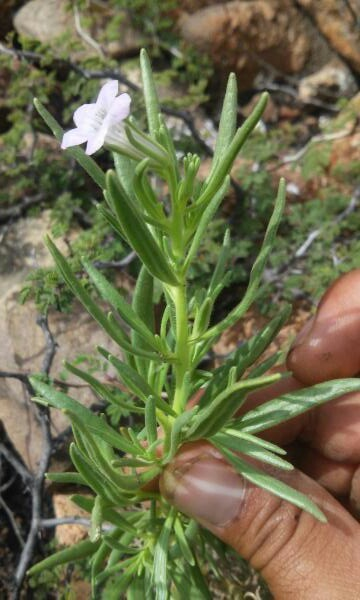 Hierba aromática en Presa San Jose, San Luis Potosi.